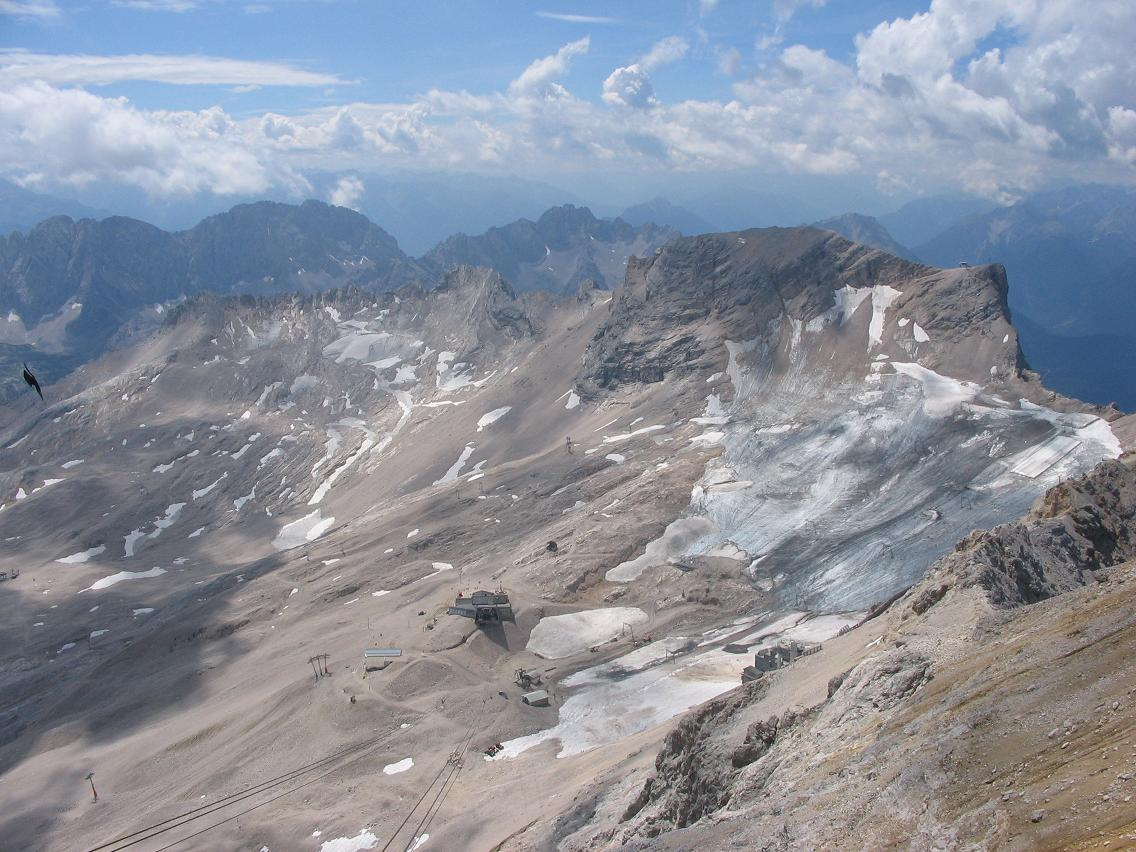 Zugspitzplatt mit Schneeferner von der Zugspitze aus gesehen.